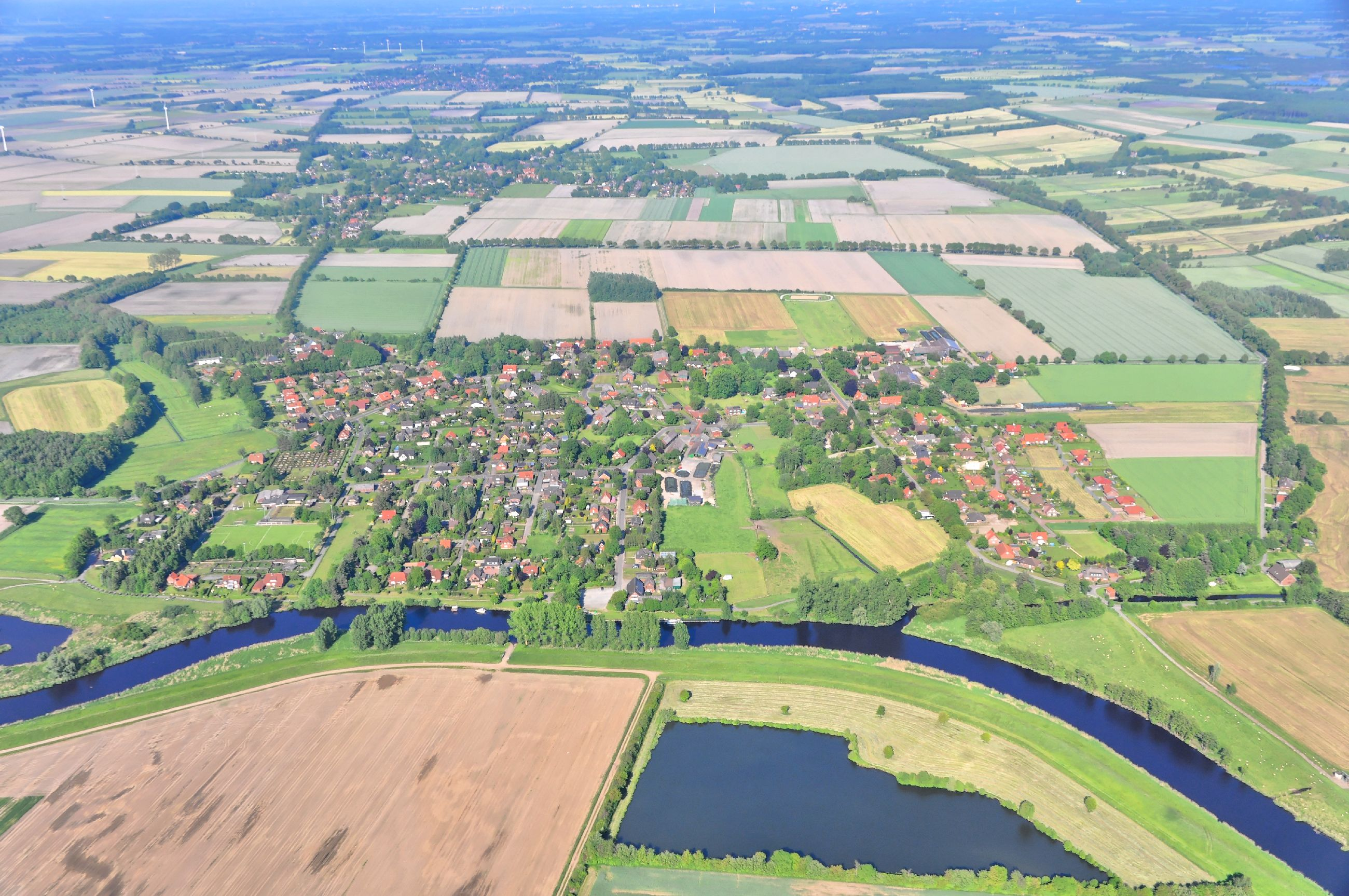 Überführungsflug vom Flugplatz Nordholz-Spieka über Lüneburg, Potsdam zum Flugplatz Schwarzheide-Schipkau